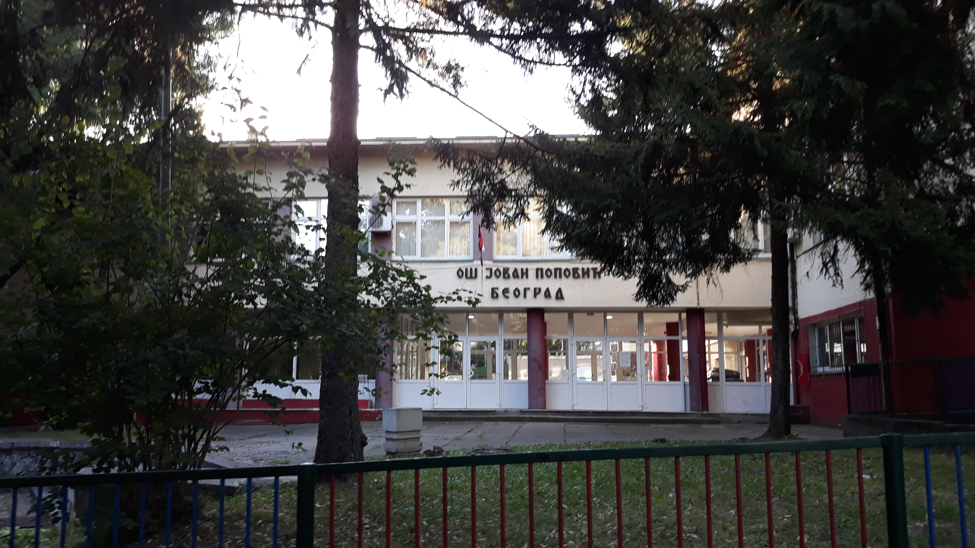 Основна школа „Јован Поповић” на Карабурми